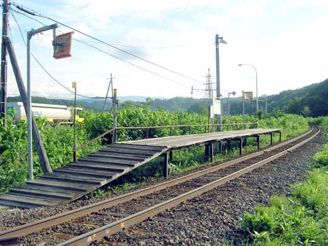 駅風景 撮影場所 東幌糠駅近くの踏切 撮影者によるGFDLリリース